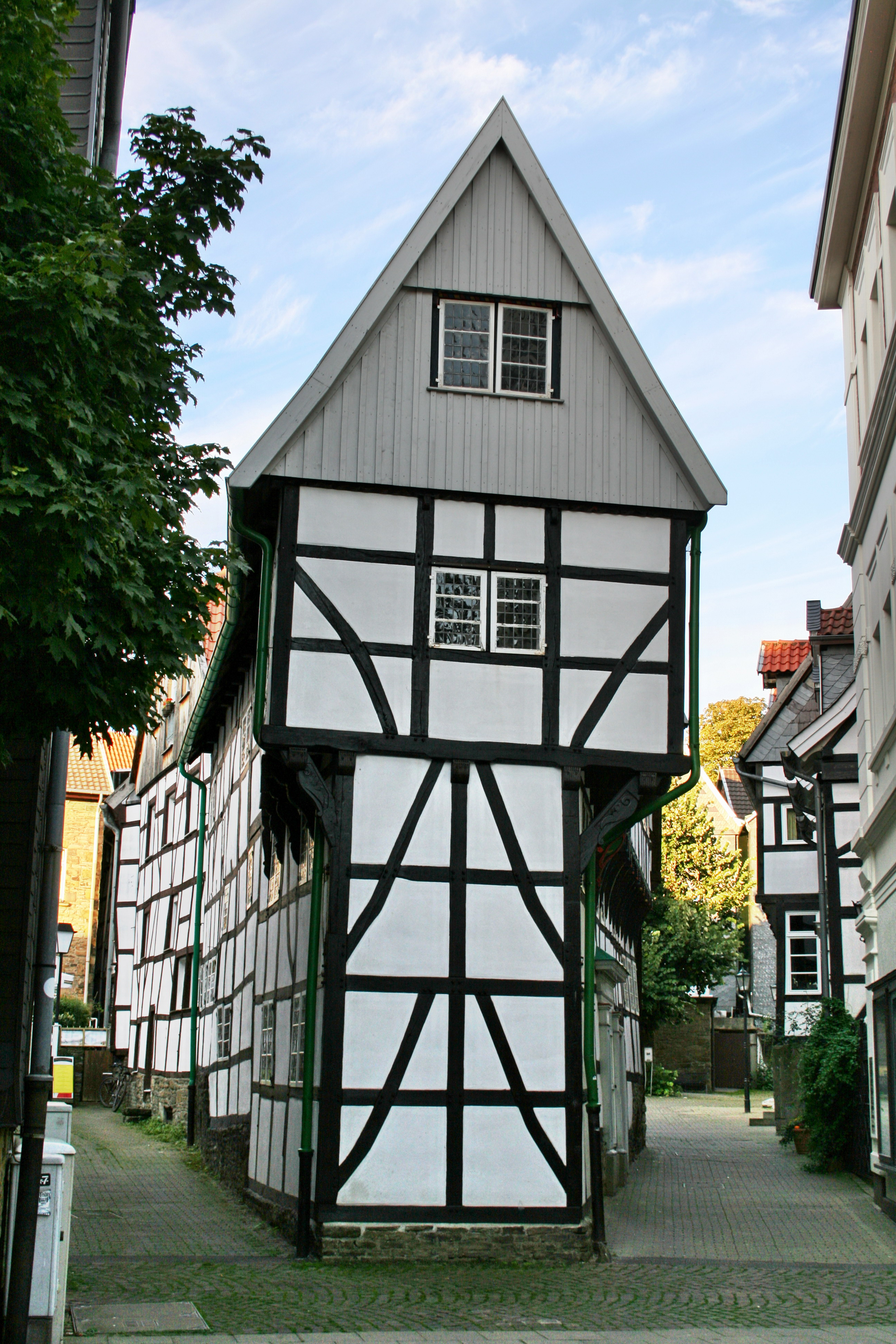 Hattingen (Ruhr): „Bügeleisenhaus“